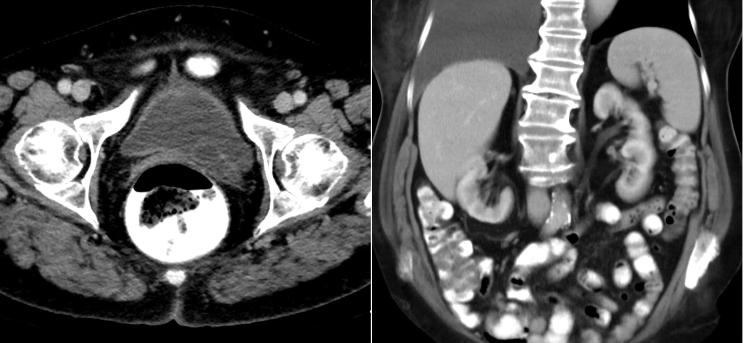 Ureterozele in der Computertomographie: Man erkennt in der axialen Schicht (linkes Bild) eine Auftreibung des von hinten in die Blase einmündenden linken Ureters (rechts im Bild). Das rechte Bild (koronar) zeigt die typischerweise dabei vorhandene Doppelanlage der linken Niere, wobei der Ureter aus der oberen Anlage unten in die Zele mündet.